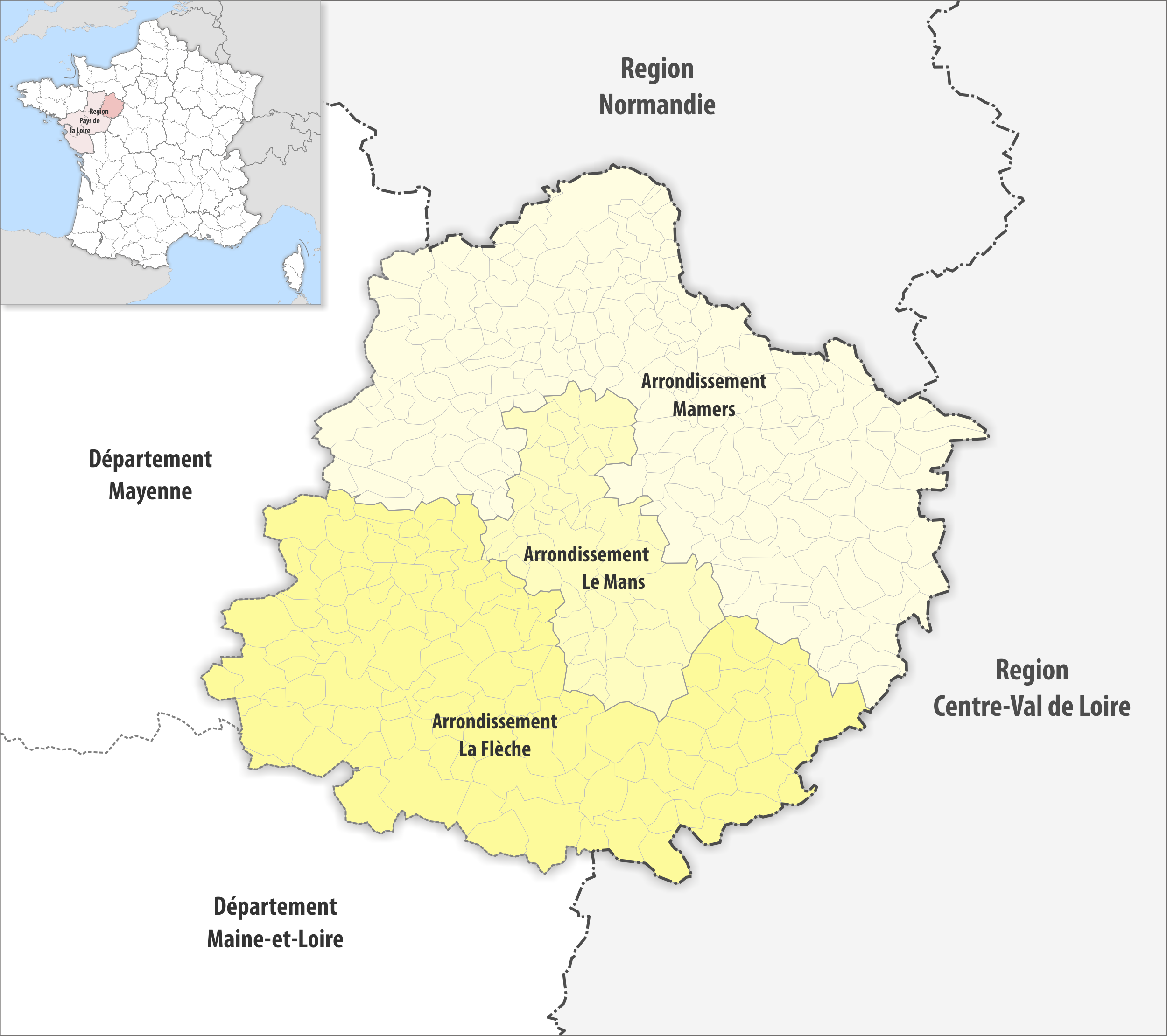 Gemeinden und Arrondissemente im Departement Sarthe